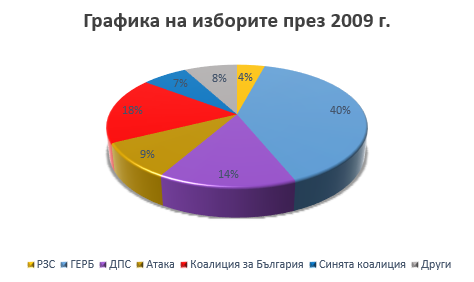 Парламентарни избори в България през 2009: графика на гласовете